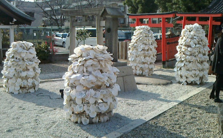 Coquillages utilisés comme ema au sanctuaire Himejima-jinja (Osaka).